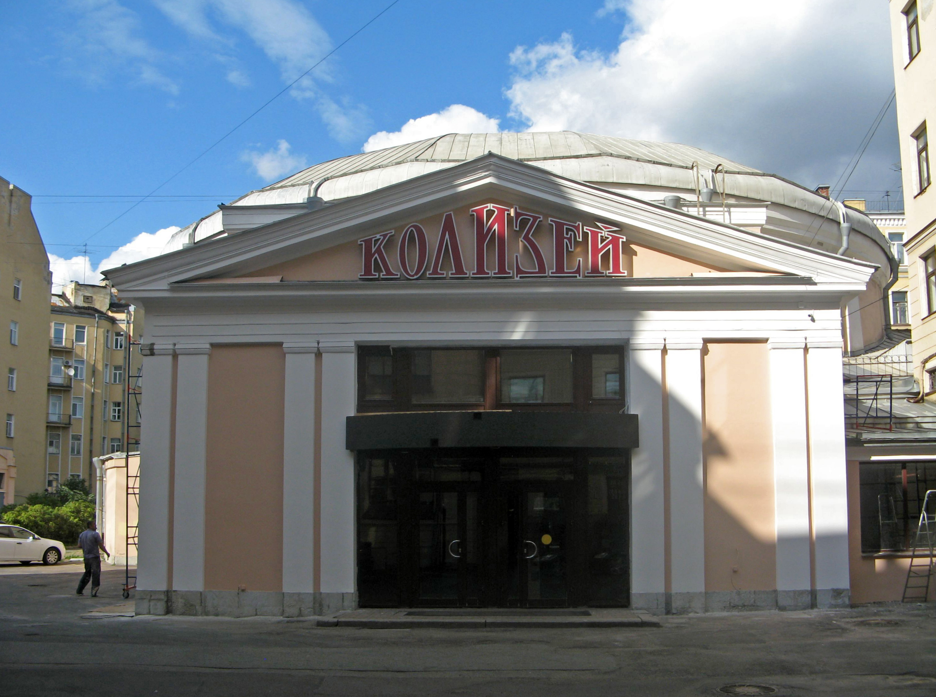 Дом М.И. Лопатина (товарищества 'Григорий Бенингсон'): Невский проспект, 100, 100И, Центральный район, Санкт-Петербург